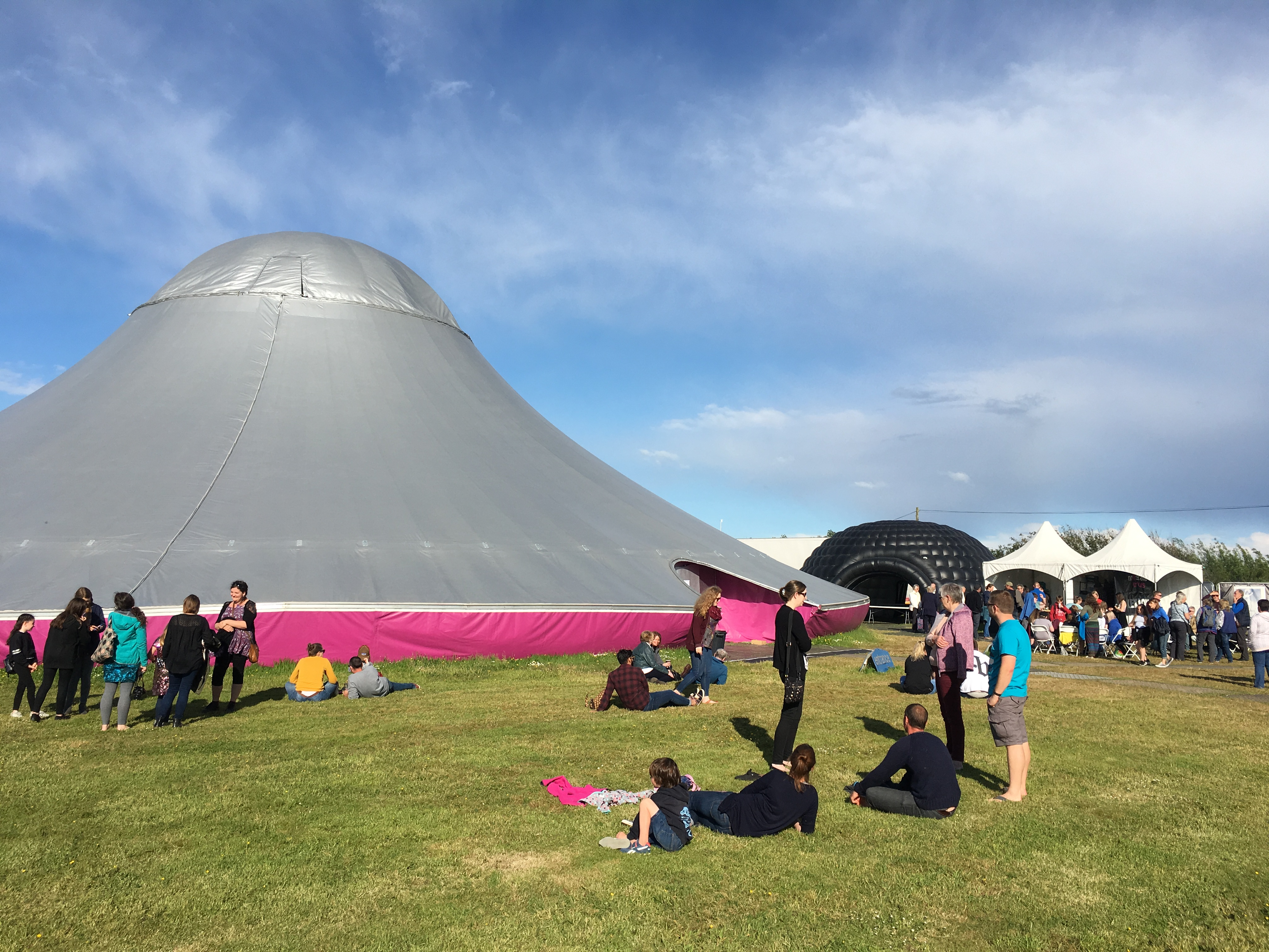 Pabell No Fit State Circus